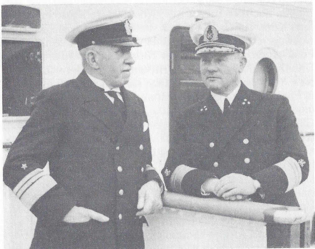 Fritz Kruse und Leopold Ziegenbein an Bord der Bremen (Schiff, 1929).